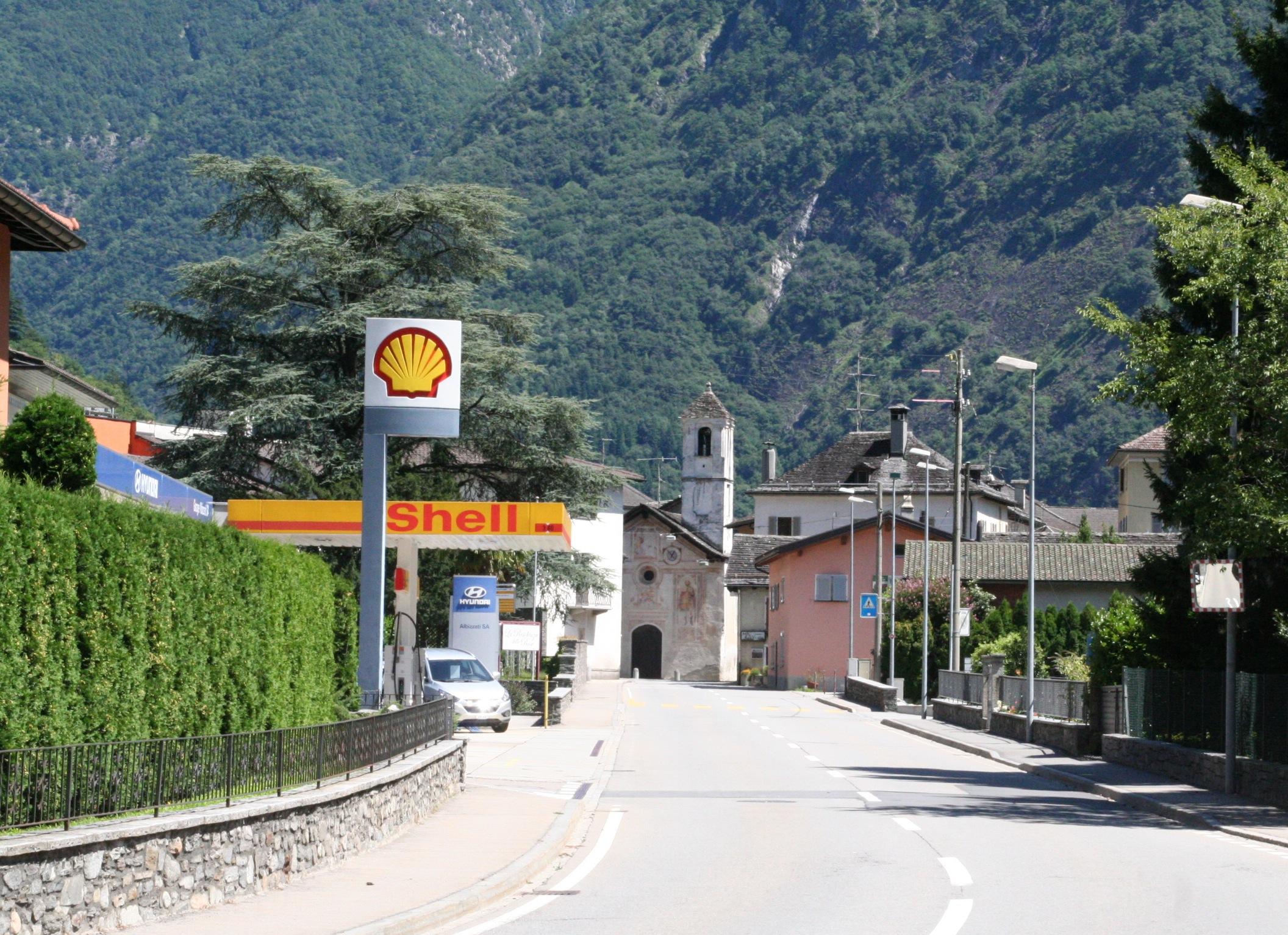 Grono